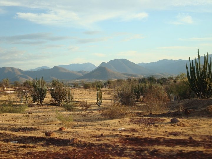 El Valle de Churumuco Michoacan